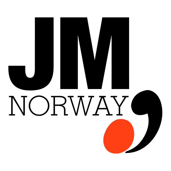 JM Norway logo